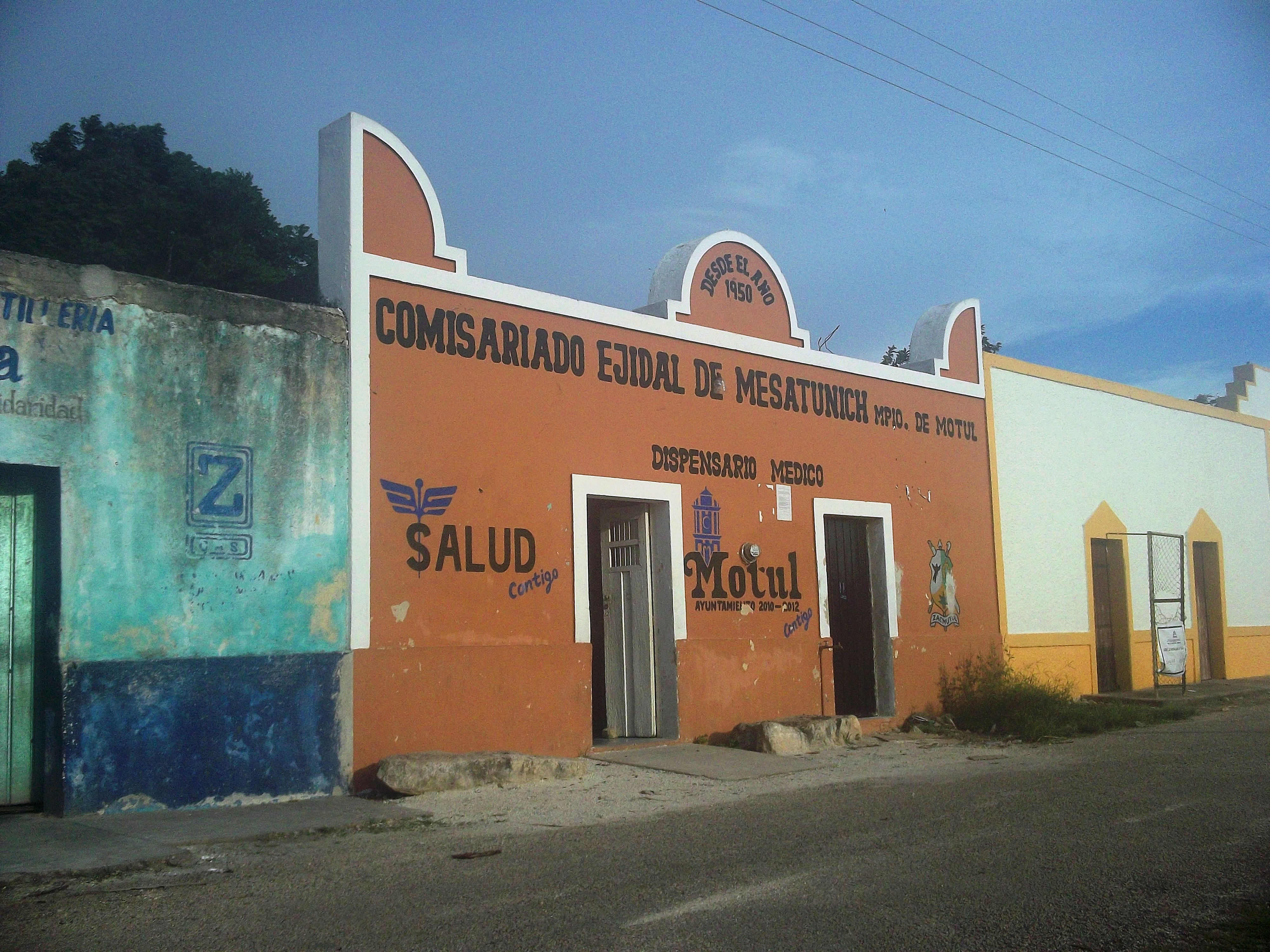 Casa comiarial de Mesatunich, Yucatán.